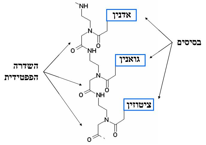 תרגום וביאור של התמונה משיתוף